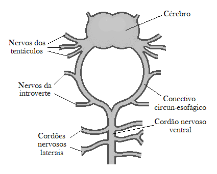 O esquema representa a porção anterior do sistema nervoso em um sipuncula, onde pode-se observar a presença de um cérebro bilobado, conectivos circun-esofágicos e um cordão nervoso ventral, com seus nervos laterais.